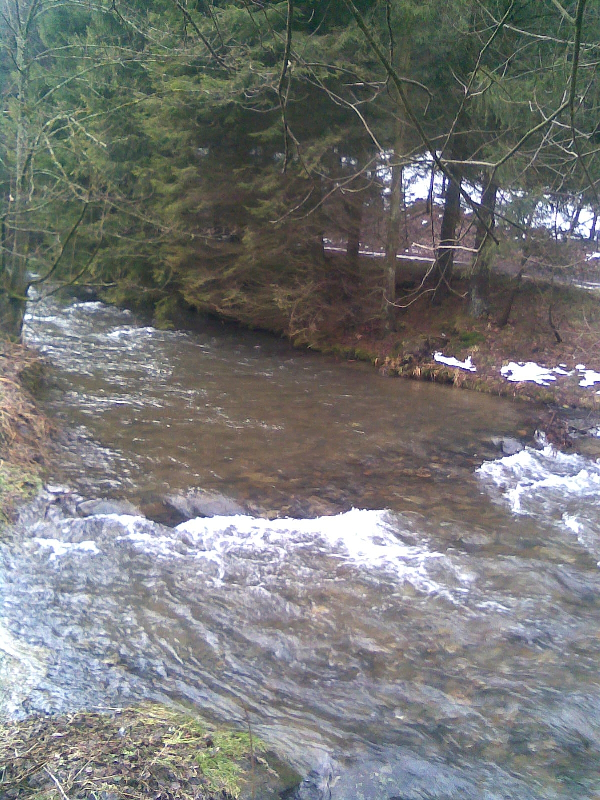 Elpe (Fluss) kurz vor Bestwig-Ostwig (Germany)